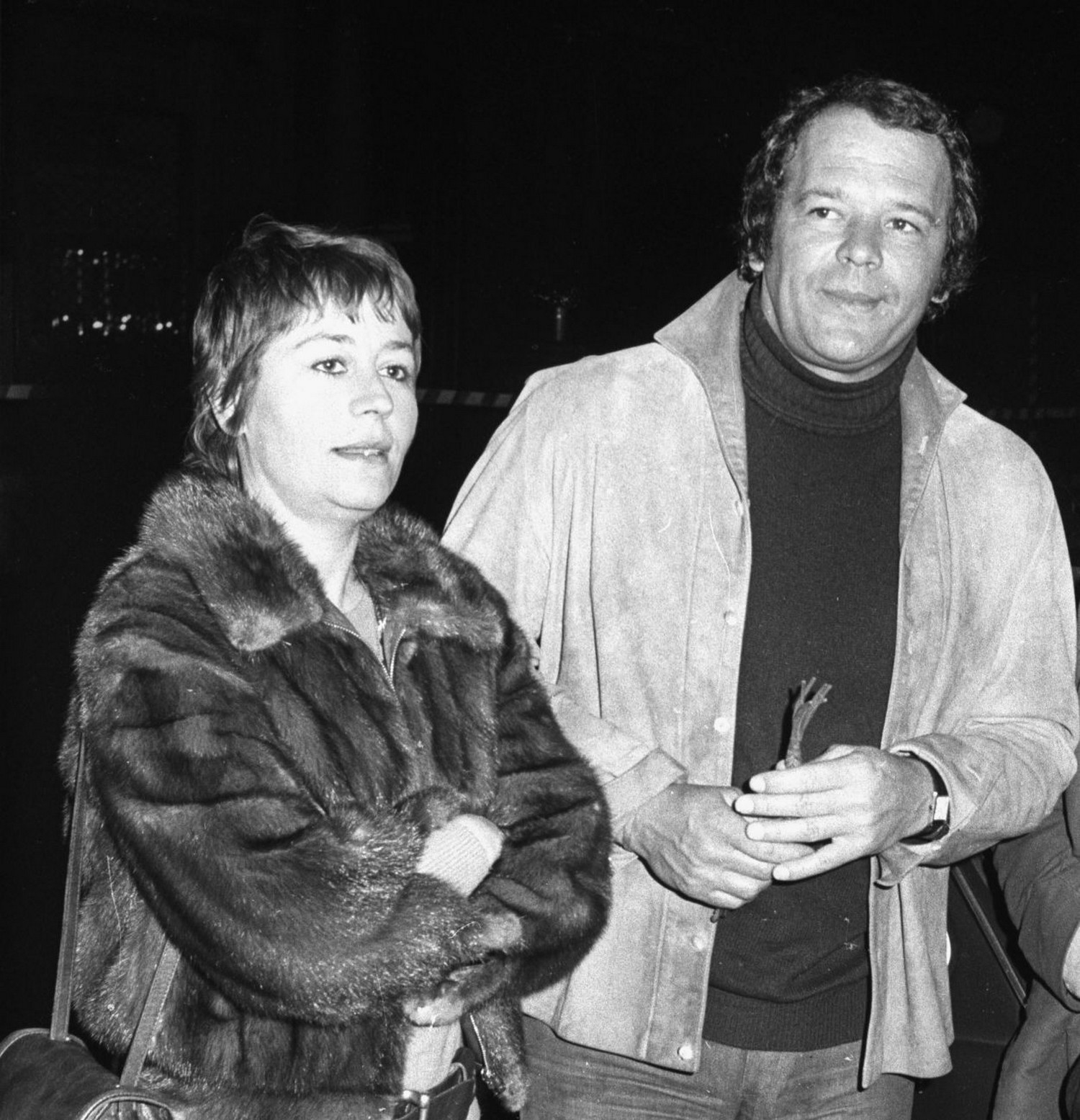 L'actrice française Annie Girardot et l'acteur italien Renato Salvatori à Rome en 1974.